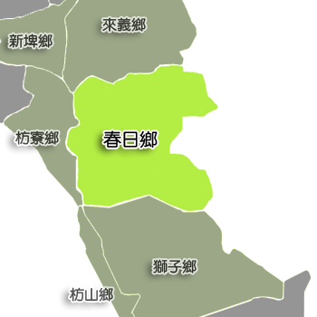 屏東縣春日鄉相對位置。